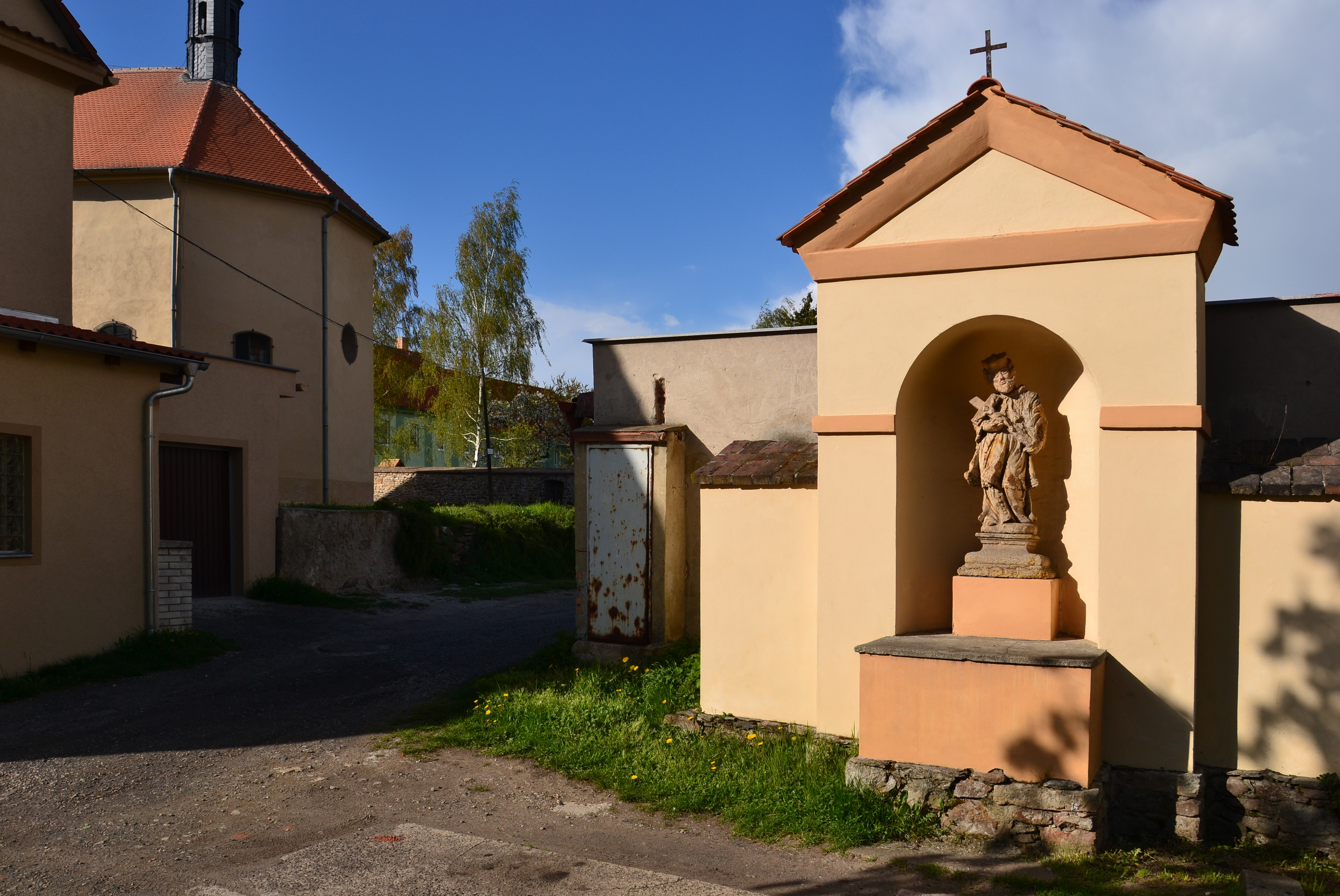 Droužkovice – výklenková kaple se sochou svatého Jana Nepomuckého